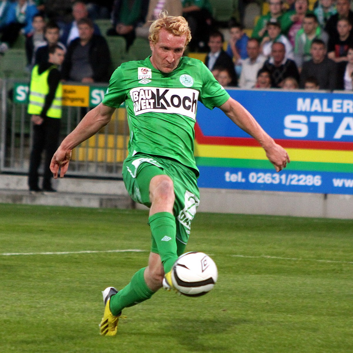 Meisterschaftsspiel der österreichischen Bundesliga: SV Mattersburg gegen SK Rapid Wien am 18. Mail 2013 (2:0)] im Mattersburger Pappelstadion.] - Das Foto zeigt Ingo Klemen (SV Mattersburg).